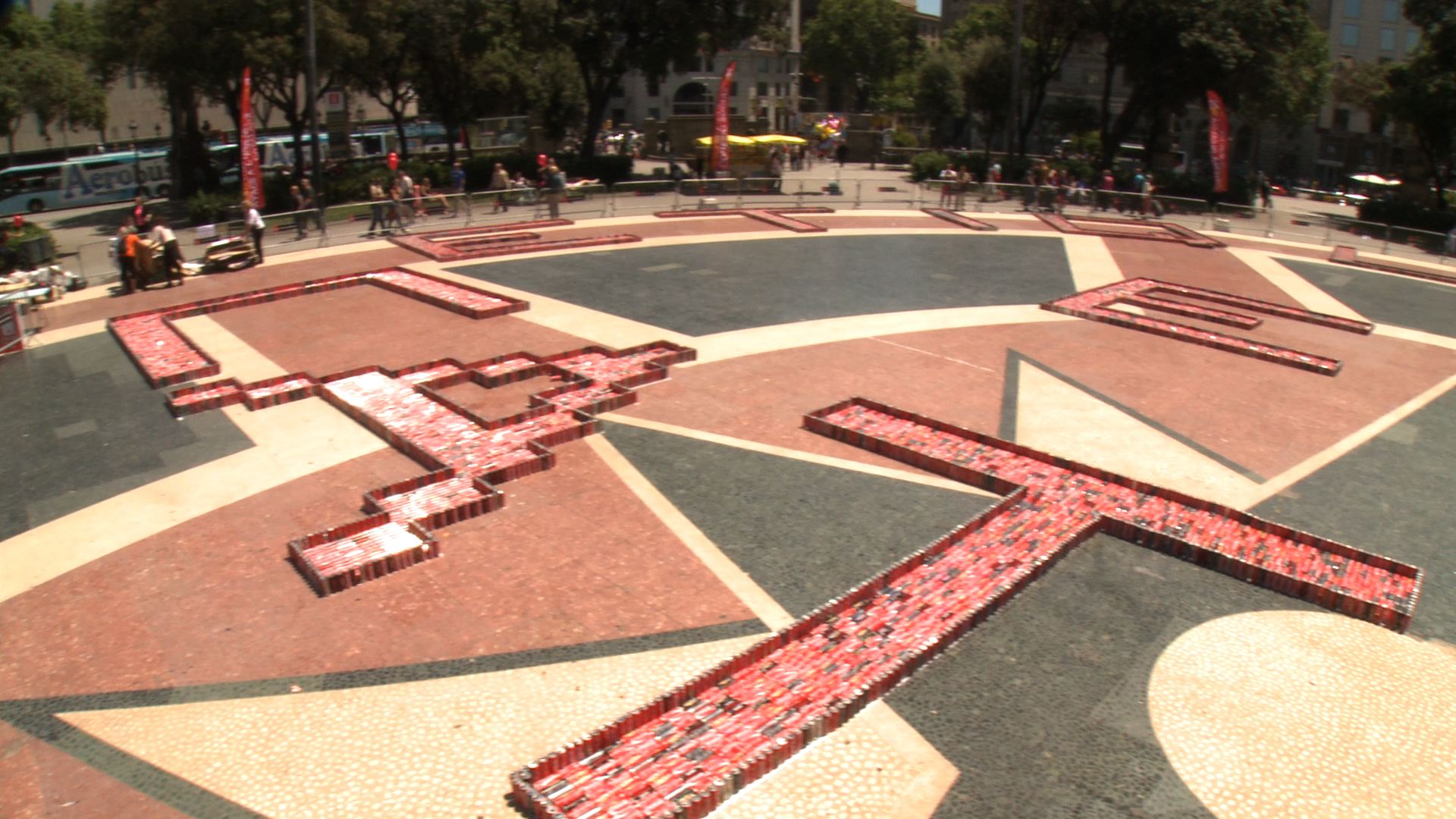 La Plataforma per la Llengua ha denunciat que grans empreses com Coca-Cola vulneren expressament la llei que garanteix el dret de rebre l'etiquetatge en català. Per denunciar això i també la responsabilitat de l'administració en aquesta qüestió, va convocar a la ciutadania a la plaça de Catalunya de Barcelona el 31 de maig del 2014 per crear un gran mural amb llaunes de Coca-cola on s'hi va poder llegir "ETIQUETEU EN CATALÀ!". El #repteCocacola va ser tot un èxit de participació ja que va doblar el número de llaunes que s'havia demanat, recollint-se finalment un total 40.000 llaunes per l'etiquetatge en català!